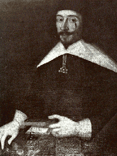 Jean Poingdestre (1609-1691) lieutenant-bailli de l'île de Jersey.